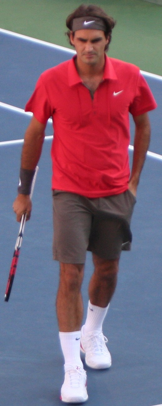 Roger Federer at the US Open 2008 refocused zoomed on Federer